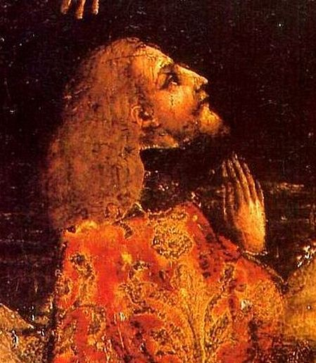 "Стјепан Томашевић, посљедњи краљ босански, клечи пред Спаситељем" (Повјест Хрвата од најстаријих времена до свршетка XIX стољећа, 37) Аутоп портрета је Јакопо Белини (Gotico in Slovenia, 56)